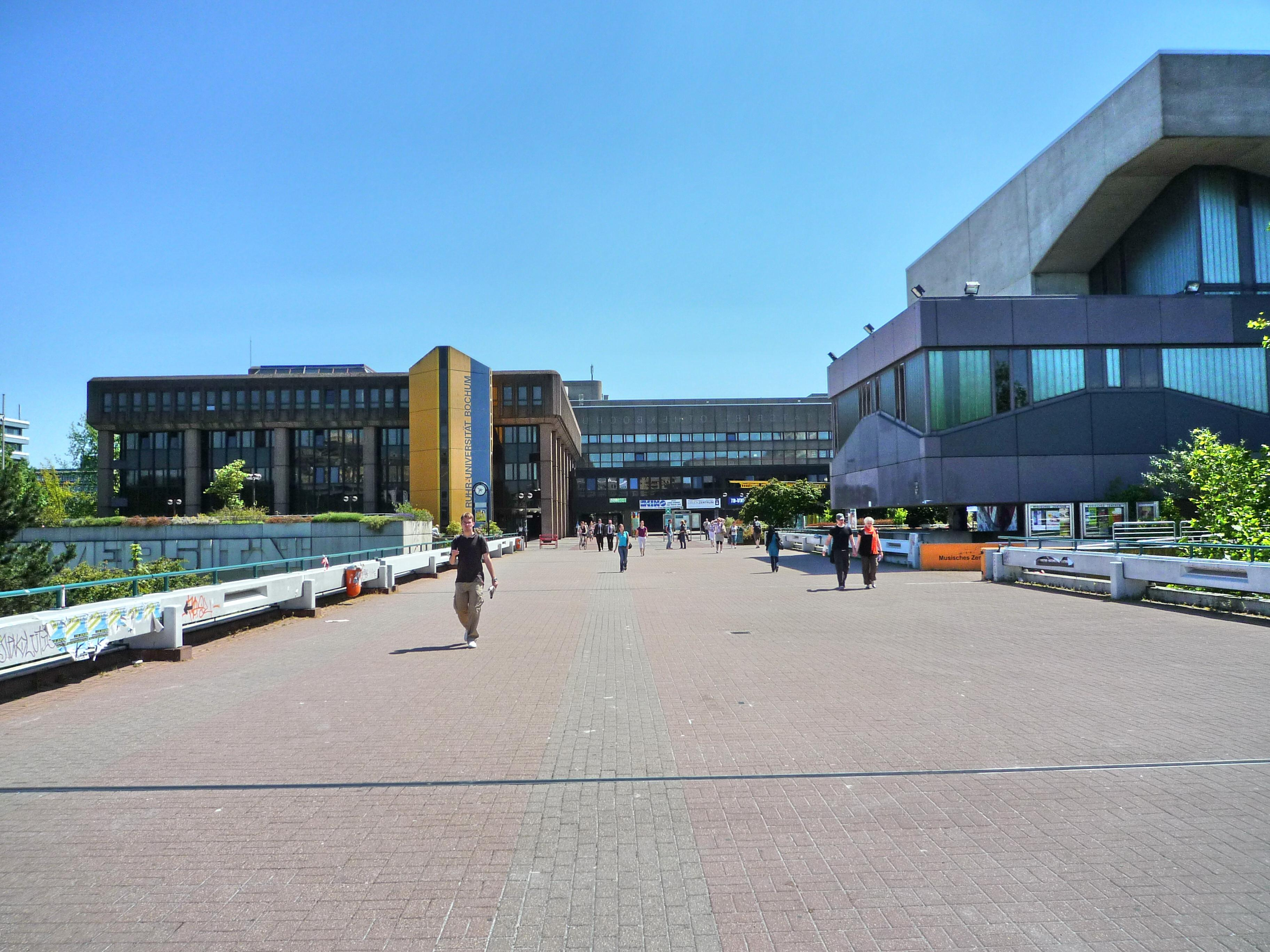 Der Haupteingang zur Ruhr-Universität Bochum. Universitätsverwaltung (linke Bildseite), Universitätsbibliothek (Bildmitte), Musisches Zentrum (rechte Bildseite)